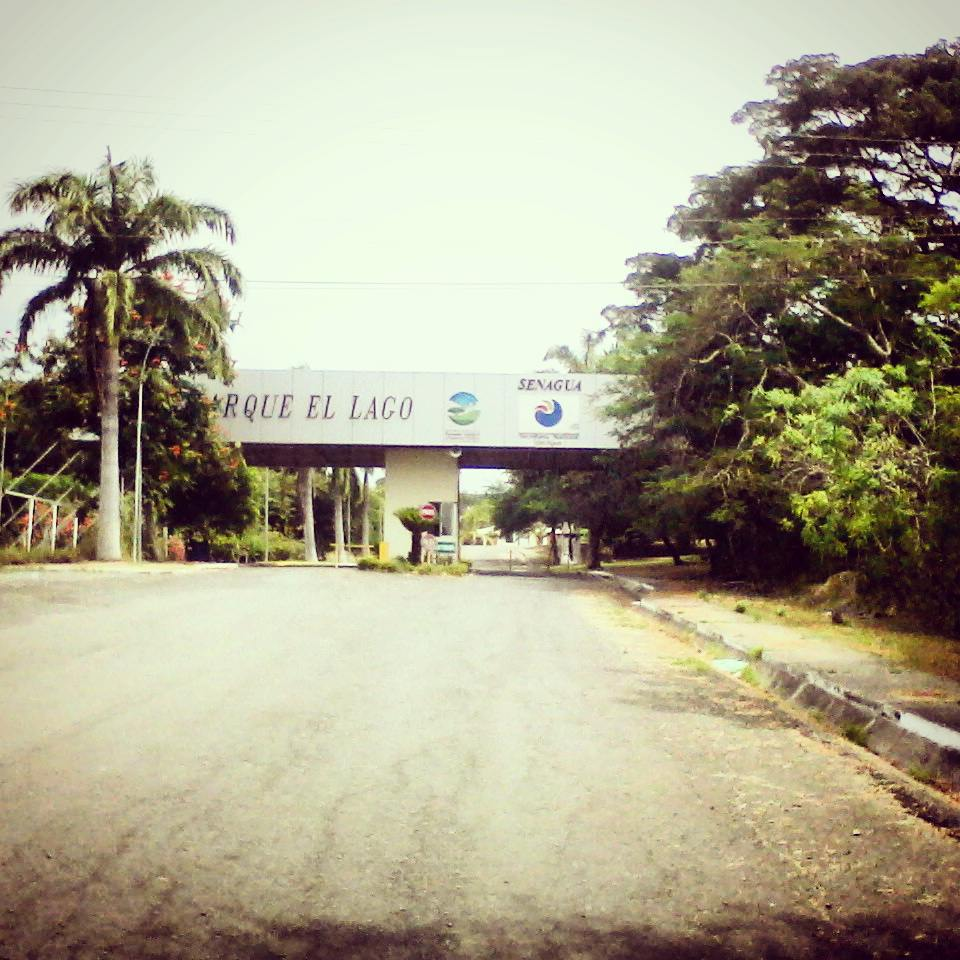 Entrada al Parque El Lago